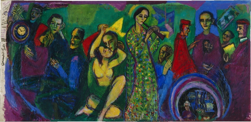 Öl auf Leinwand 150,5 x 330 cm Privatbesitz